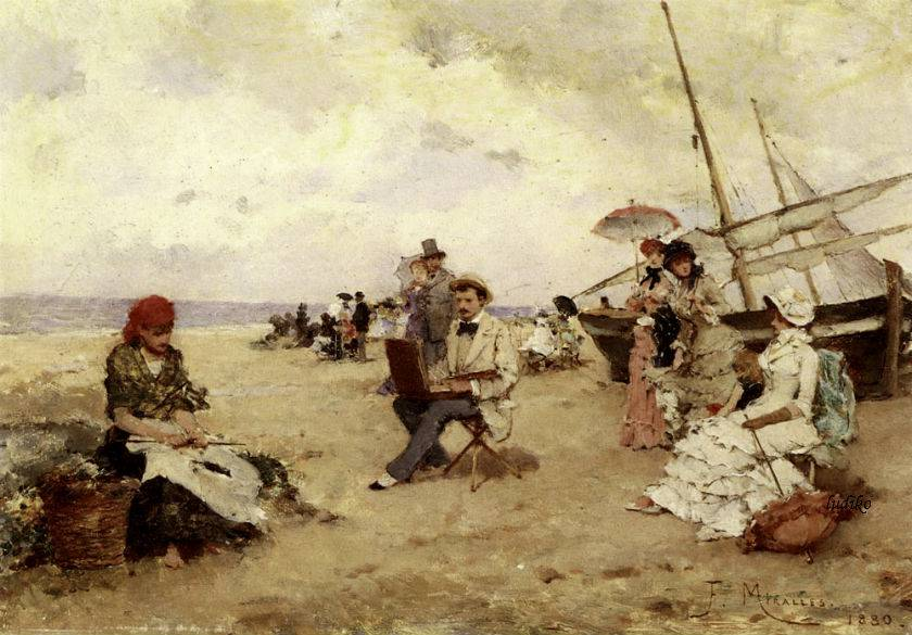 Un dia en la platja, 1880. Oli sobre fusta, 18 x 36 cm, Col·lecció Particular.